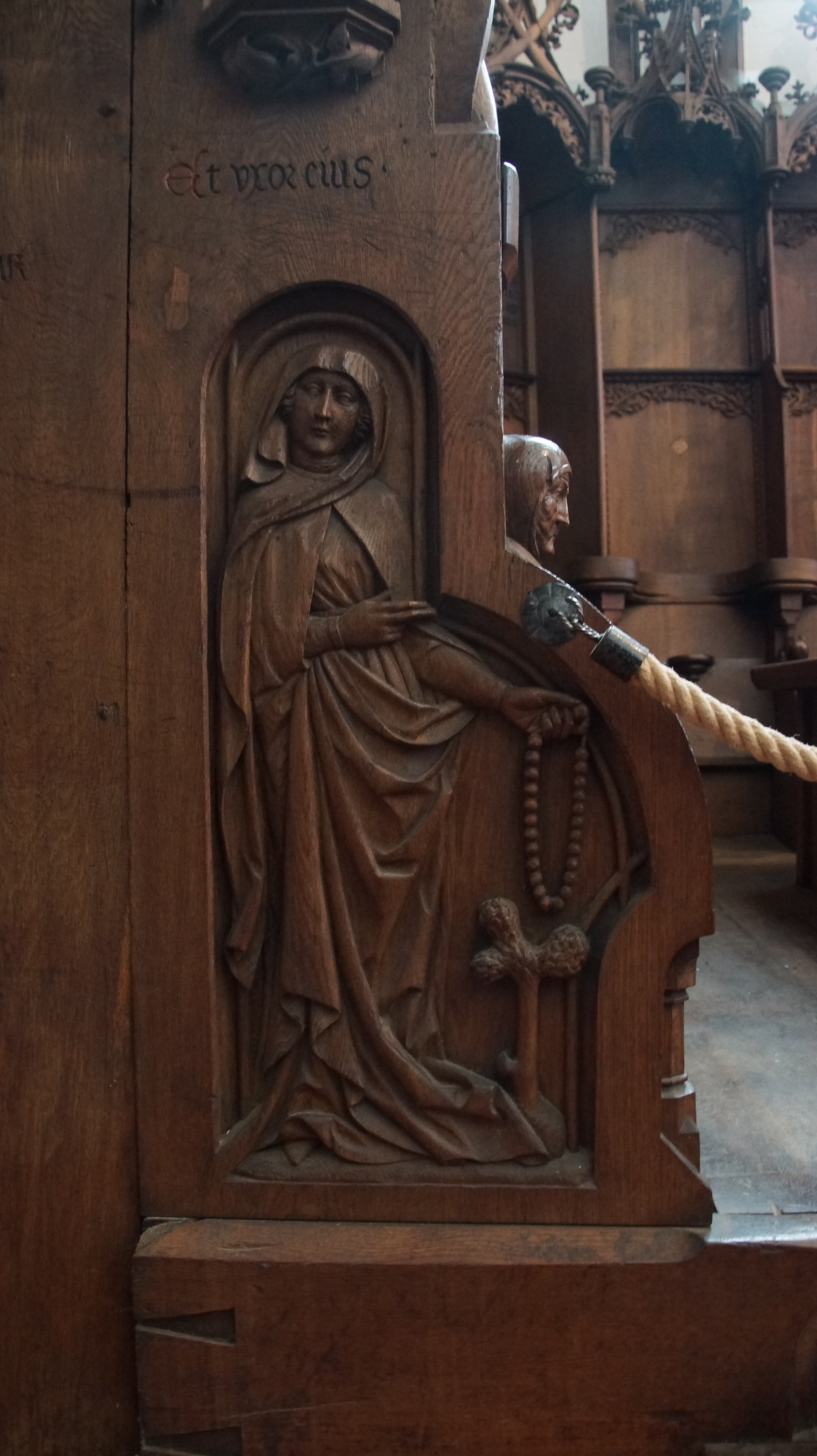 "et uxor eius"